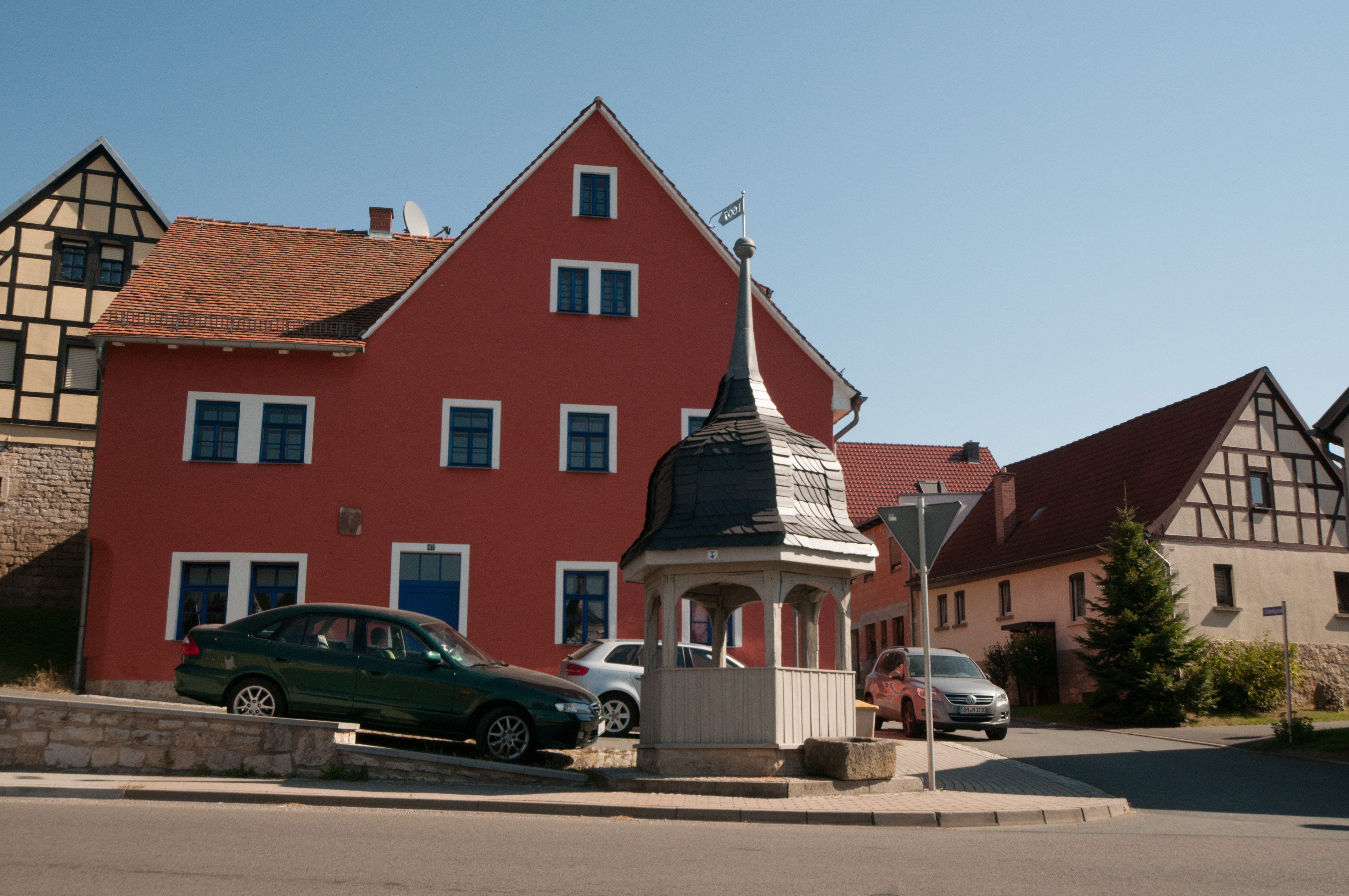 Gemeinde Mellingen in Thüringen